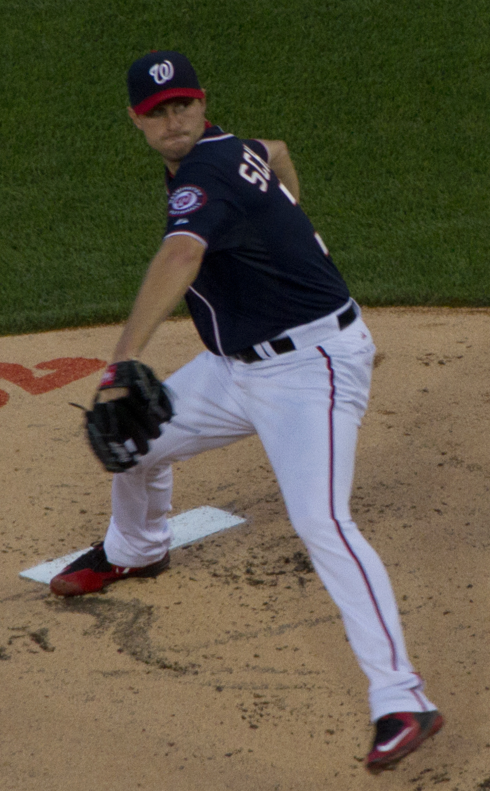 Max Scherzer